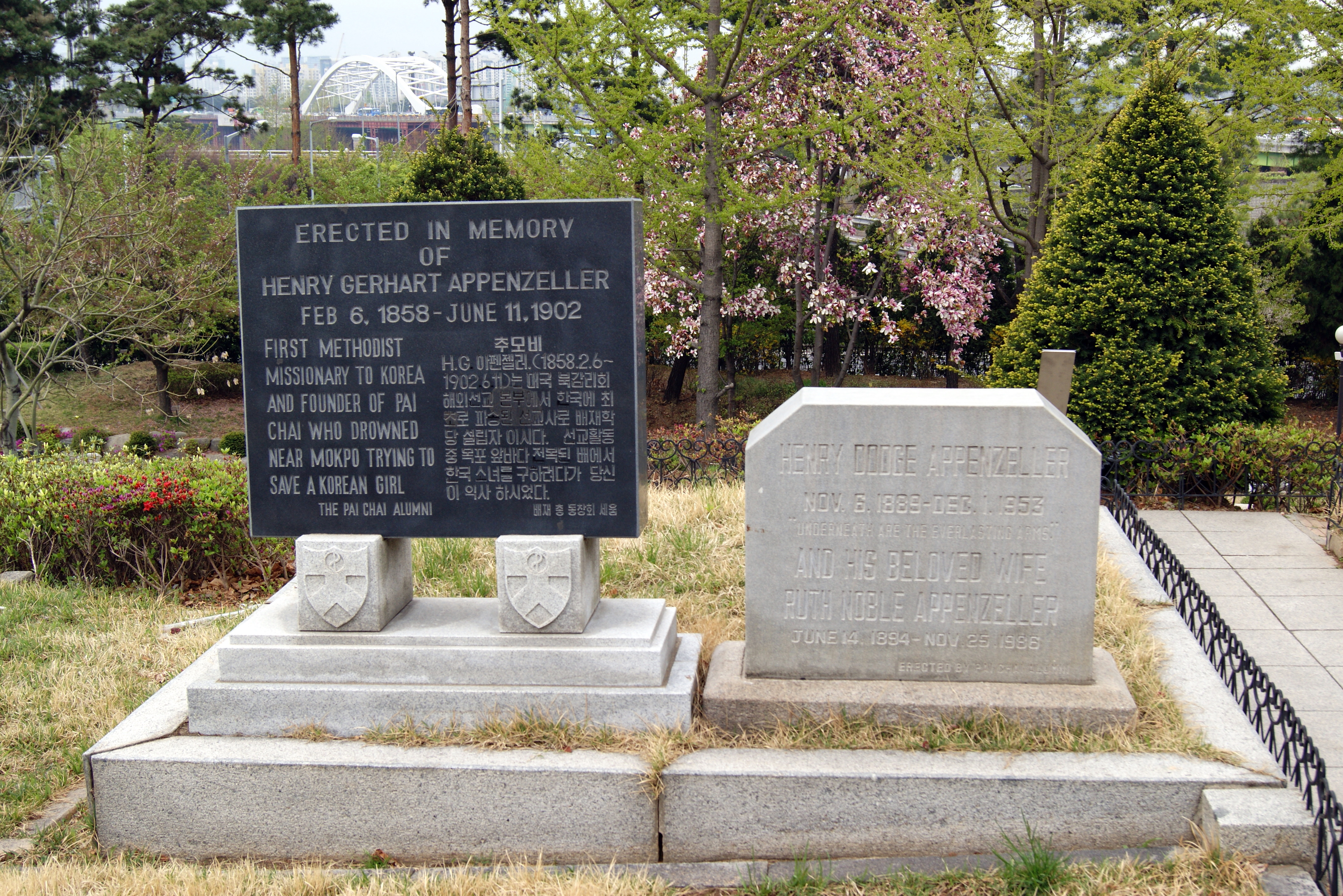 Grab von Henry Gerhart Appenzeller in Yanghwajin Friedhof, Seoul, Südkorea